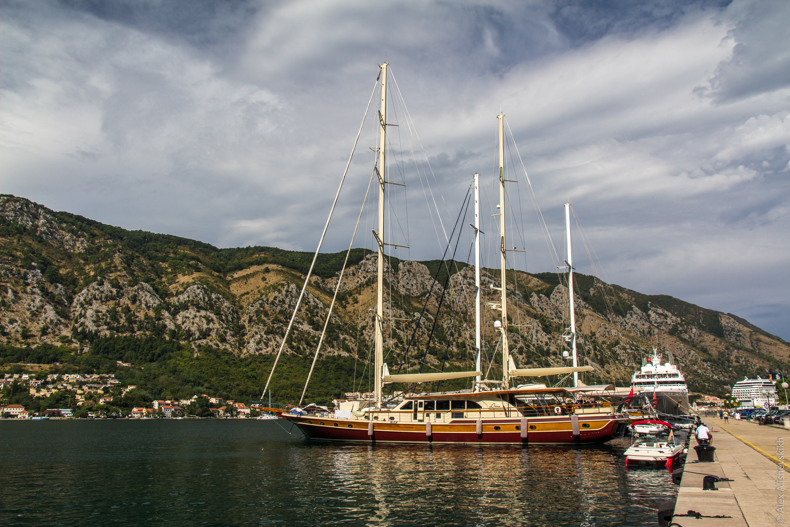 Kotor